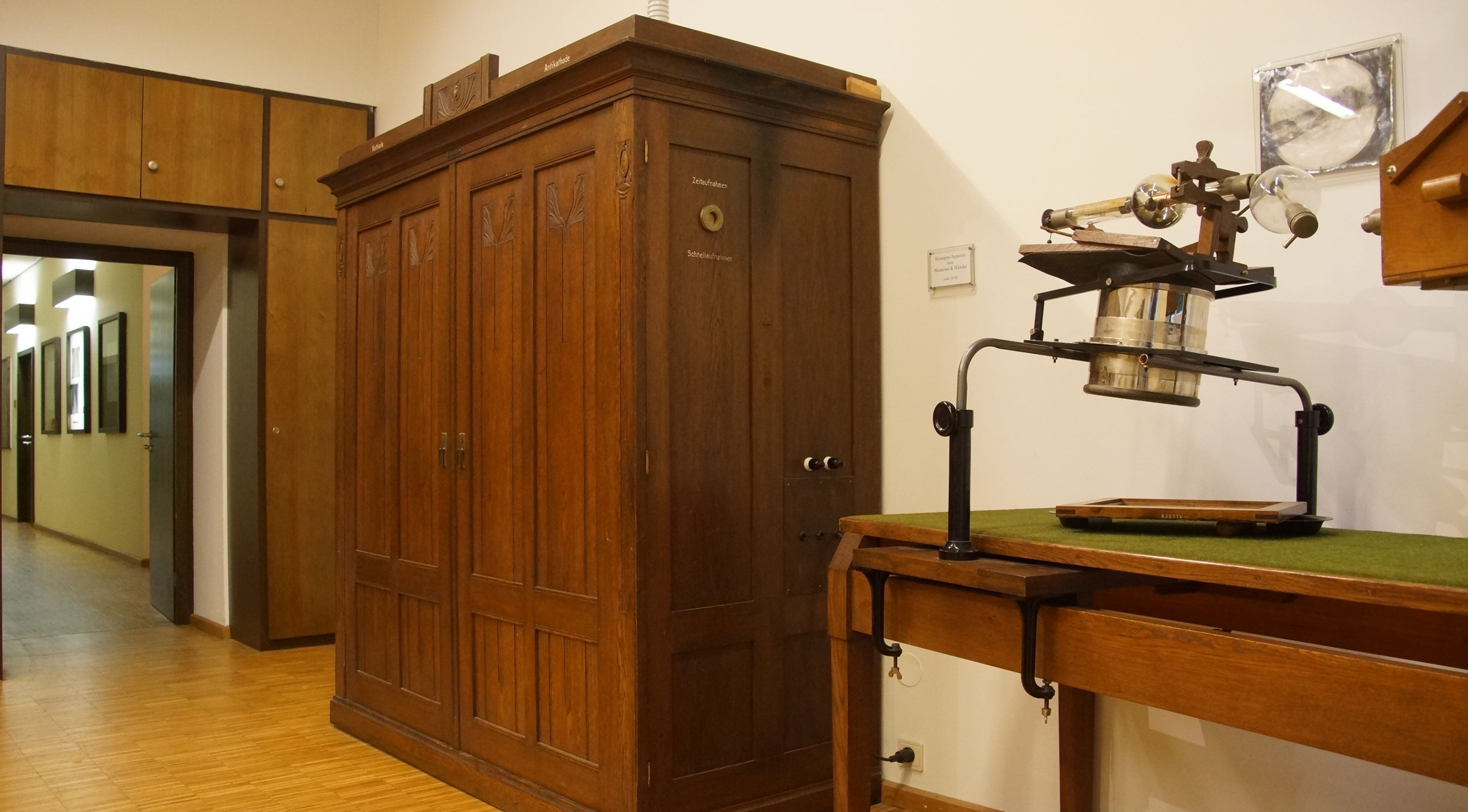 Aufgenommen während des zweiten Stammtischs von WP:Unterfranken in Würzburg